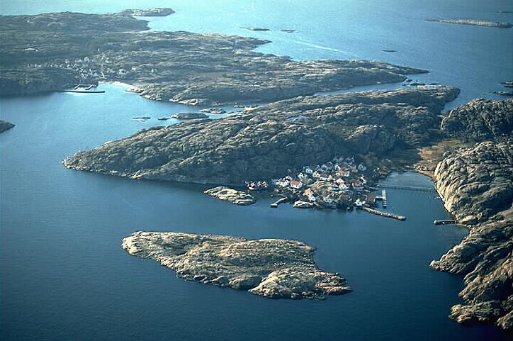 Stora (Lyse sn). Väl bevarade fiskelägen. Kontakten näringsliv - bebyggelsen är påtaglig. Tidsskede 1700-1800-tal. Lyse 667, en av lämningarna. Motiv: Stora och Lilla Kornö Nyckelord: Flygbilder, Naturreservat, Riksintressen Kategori: Kust- och skärgårdsmiljö, Fiskeläge Stora (Lyse sn). Väl bevarade fiskelägen. Kontakten näringsliv - bebyggelsen är påtaglig. Tidsskede 1700-1800-tal. Lyse 667, en av lämningarna.